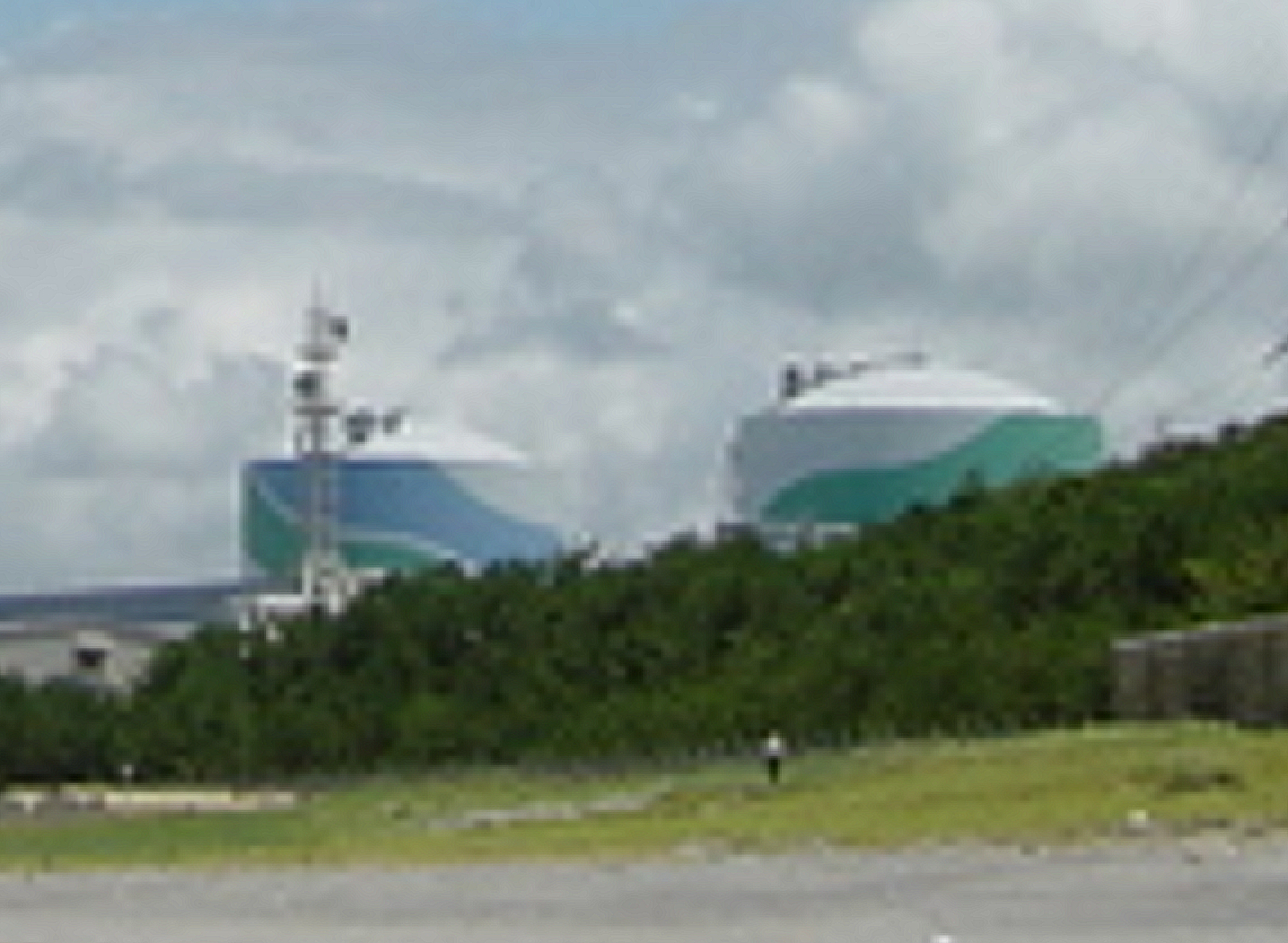 川内原子力発電所 Licensing Category:日本の原子力発電所